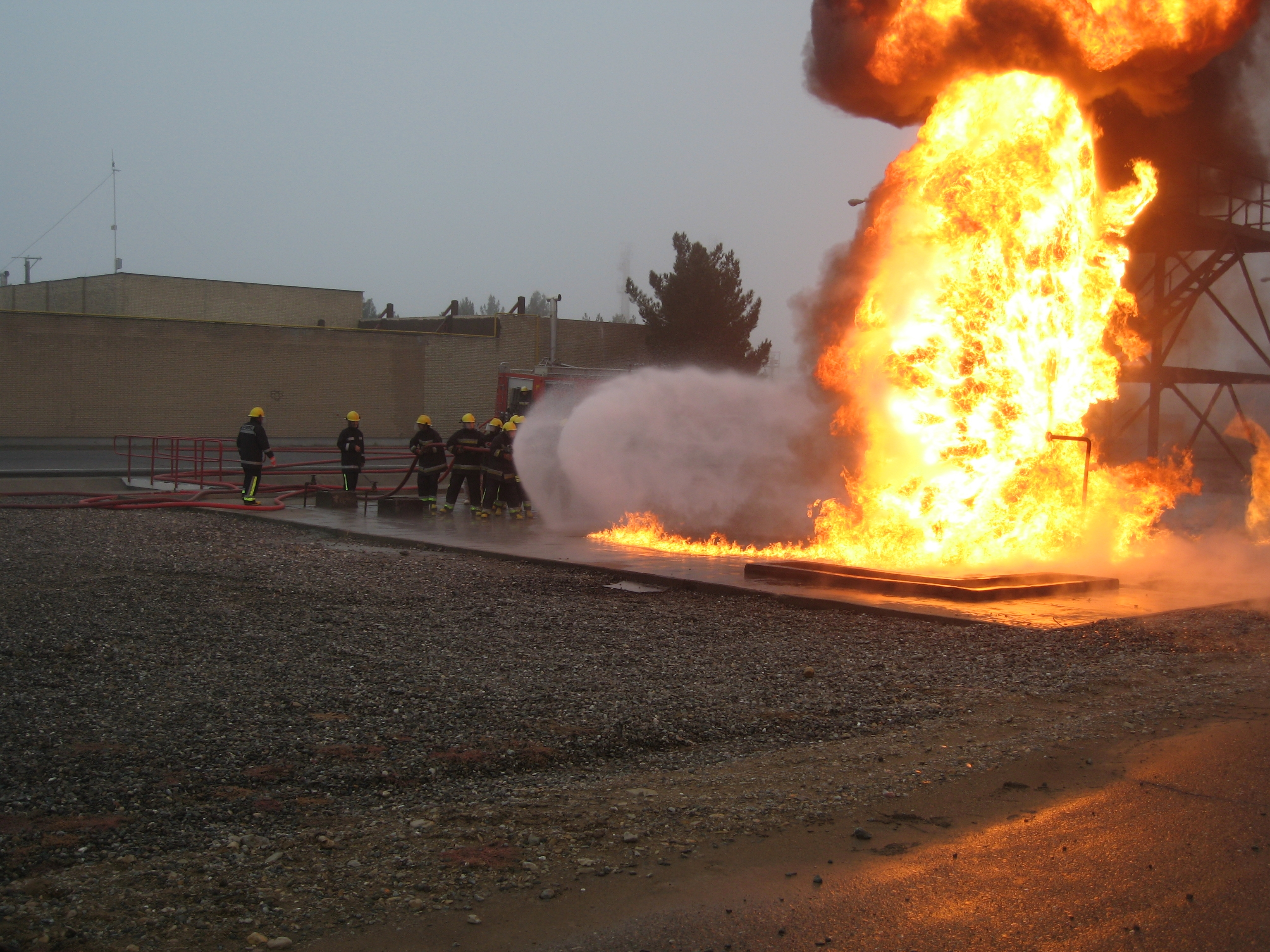 آتش